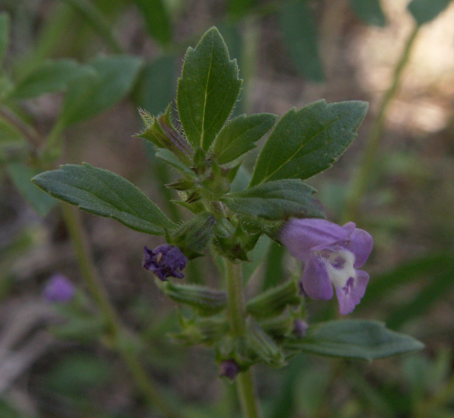 Acinos arvensis